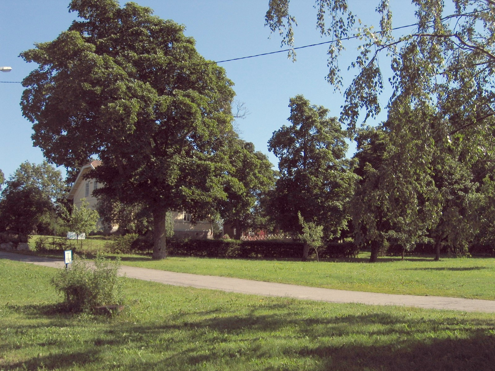 Old village of Fastböle in Kuninkaala district, Vantaa, Finland